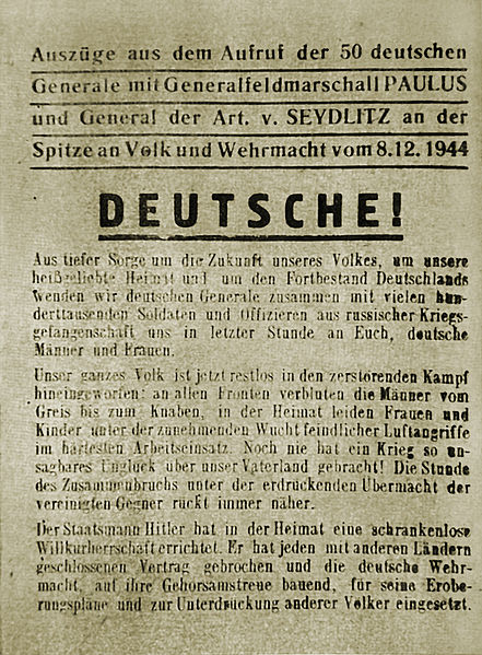 NKFD Flugblatt. Auszug aus dem Aufruf der 50 deutschen Generale